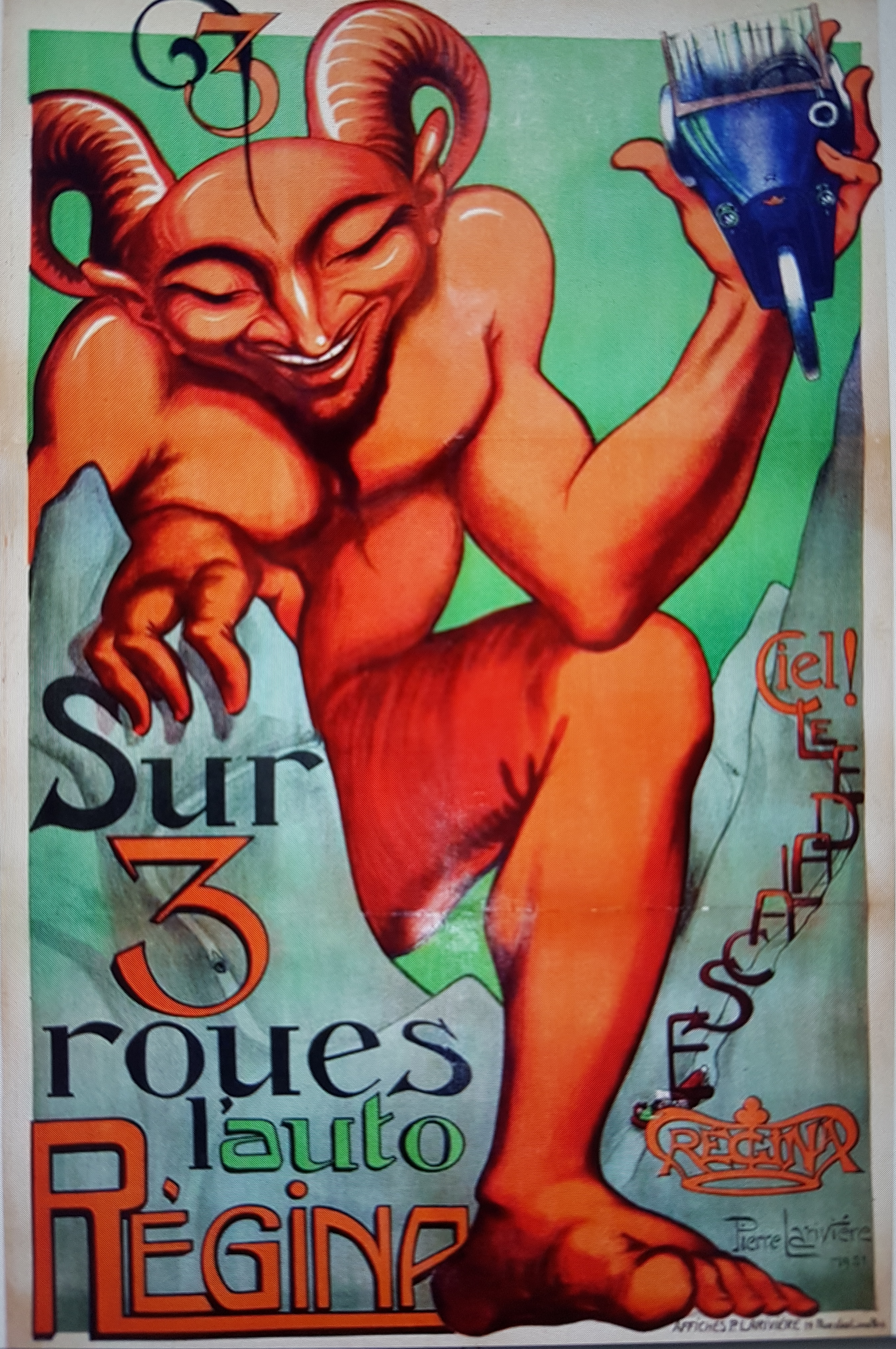 Automobiles Regina, von Pierre Larivière 1921